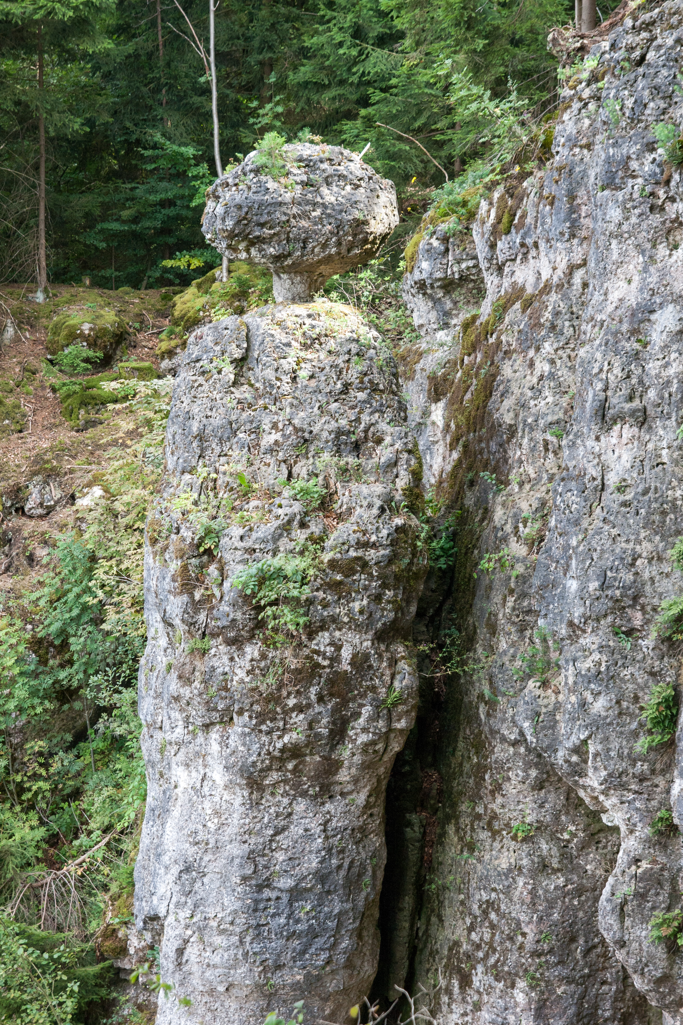 Felsturm, Schwammerl, St. Colomann, Velburg, Geotop